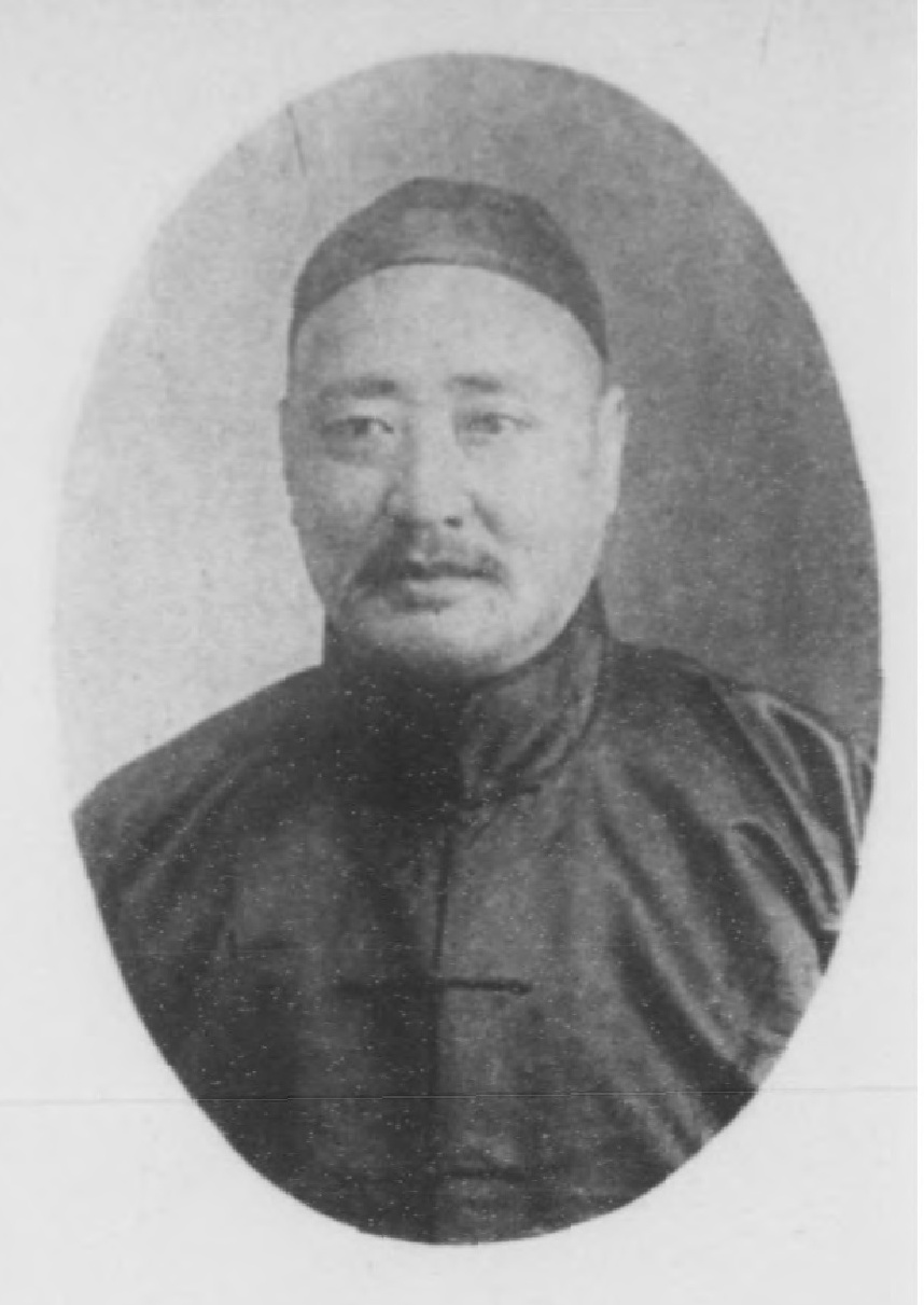 光緒甲辰科進士小像